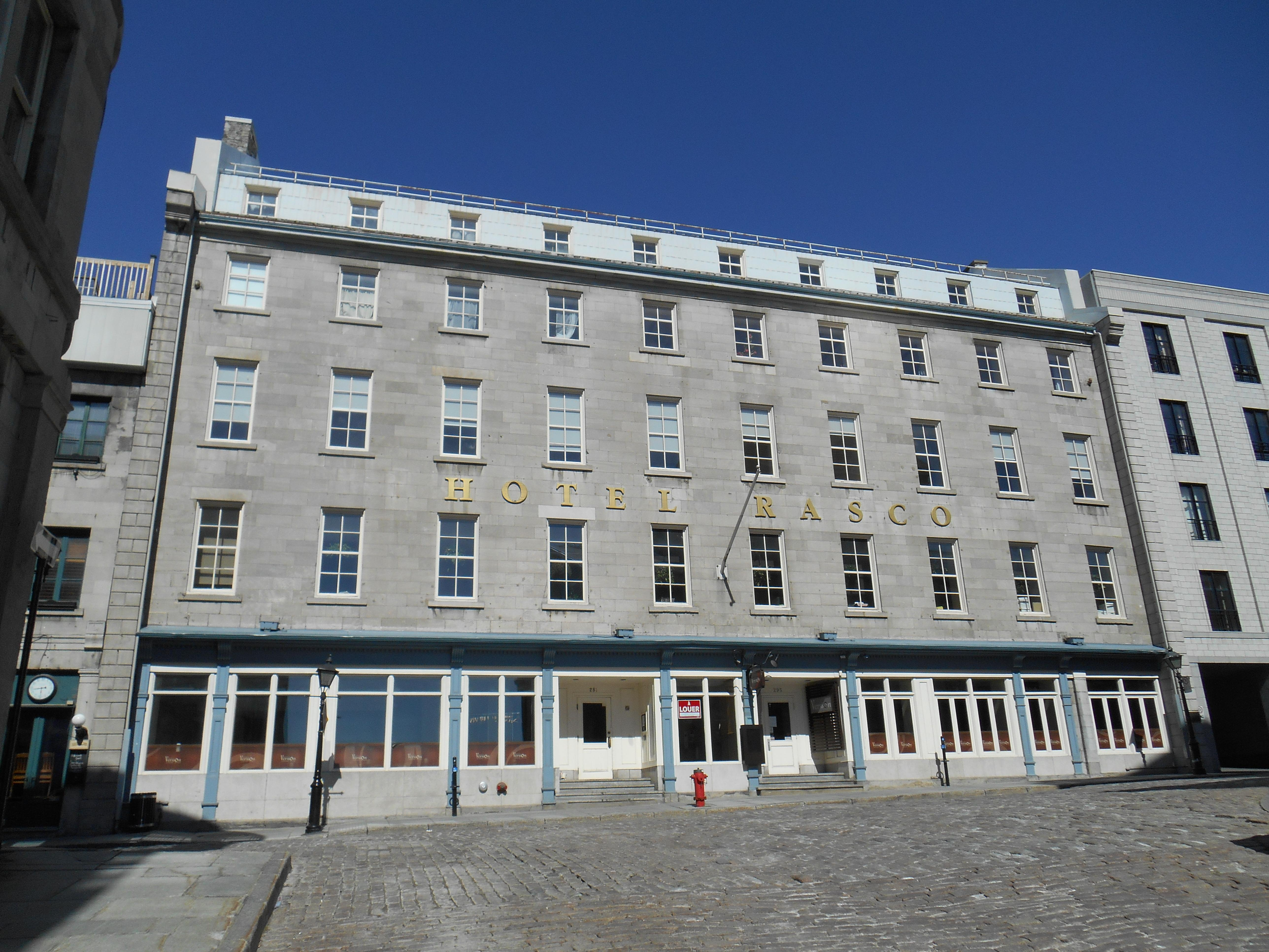 Hôtel Rasco (autres appellations: Hôtel Bytown, Hôtel Mack), 281-295, rue Saint-Paul Est, Montréal